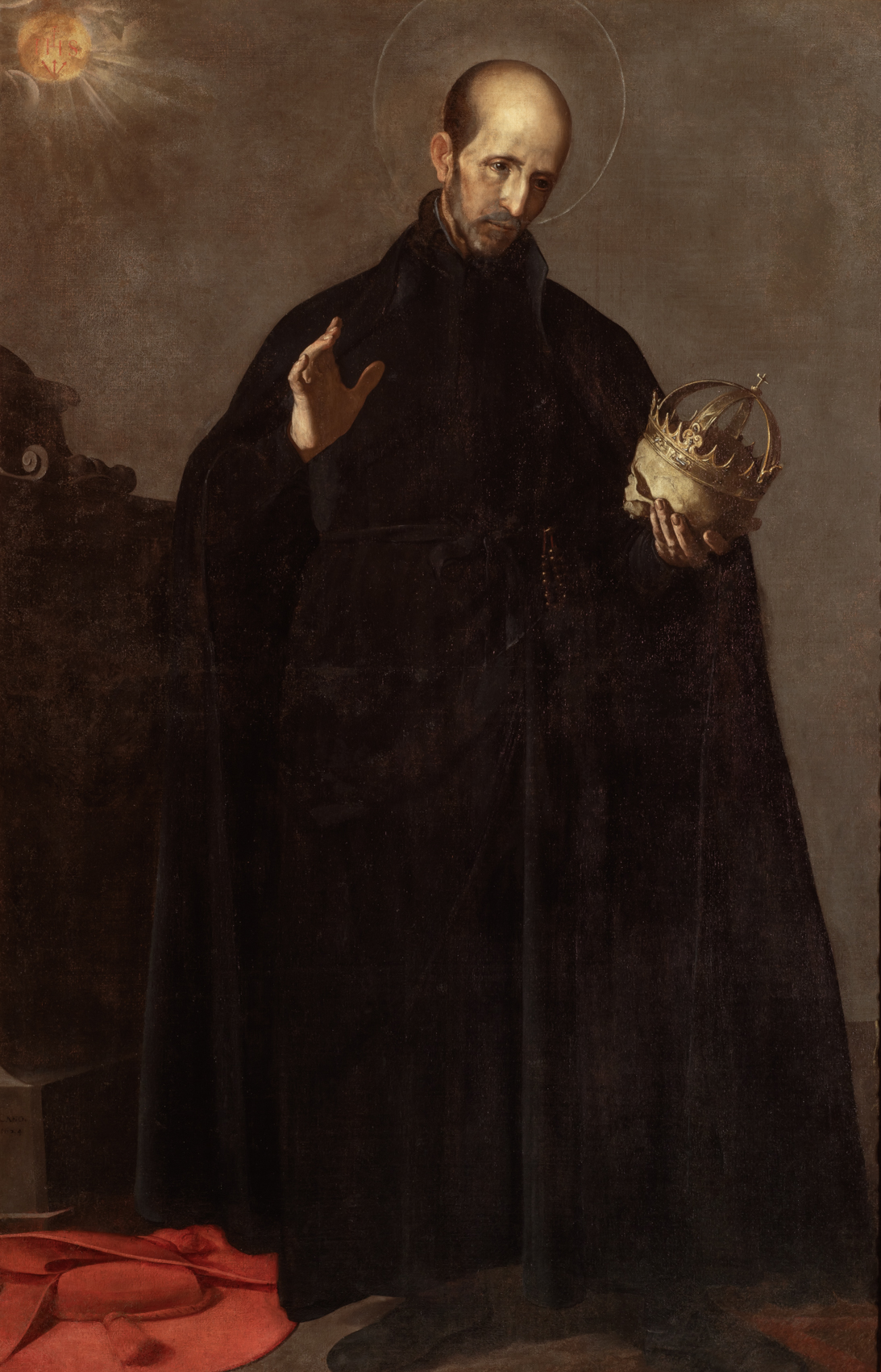 El lienzo representa a San Francisco de Borja (1510-1572), duque de Gandía y general de la Compañía de Jesús.